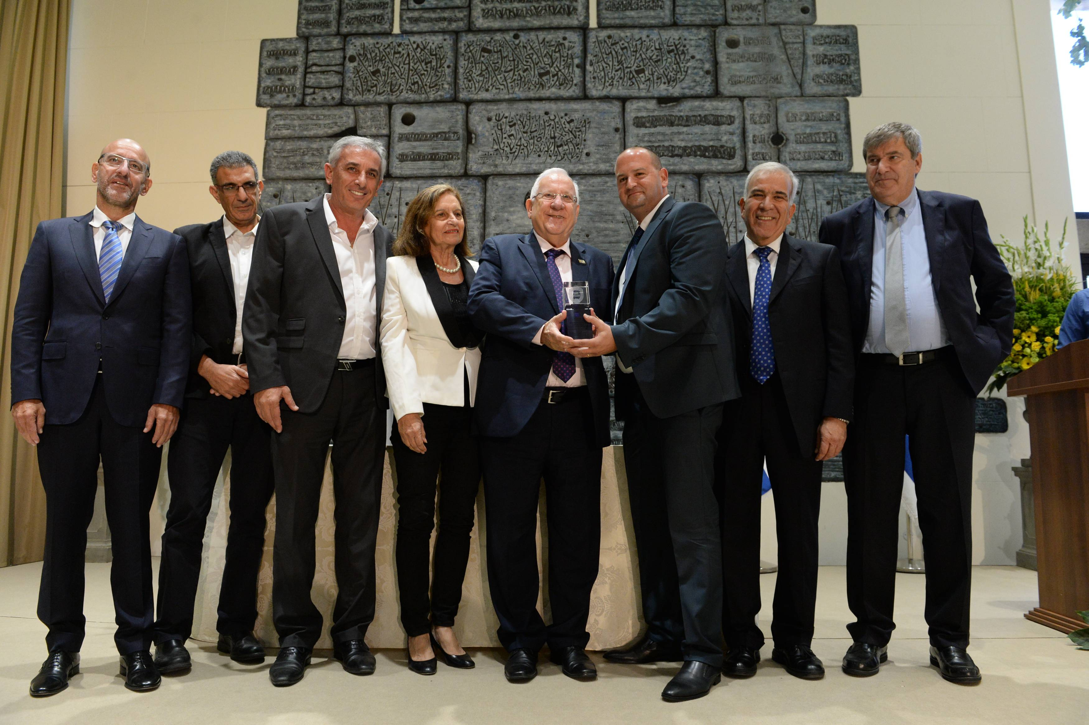 נשיא מדינת ישראל ראובן ריבלין מעניק לקבוצת הפועל כפר סבא את פרס מועדון האוהדים, עם יו"ר מנהלת הליגות לכדורגל מר יורם באומן, יו"ר ועידת הפרס השופטת עדנה בקשטיין, בעל קבוצת הפועל כפר סבא סתיו שחם, מנכ"ל משרד הספורט והתרבות מר יוסי שרעבי, מ"מ יו"ר התאחדות לכדורגל מר תמיר גילת, יו"ר הטוטו מר יוסי פילוס, וראש עיריית כפר סבא מר יהודה בן חמו.